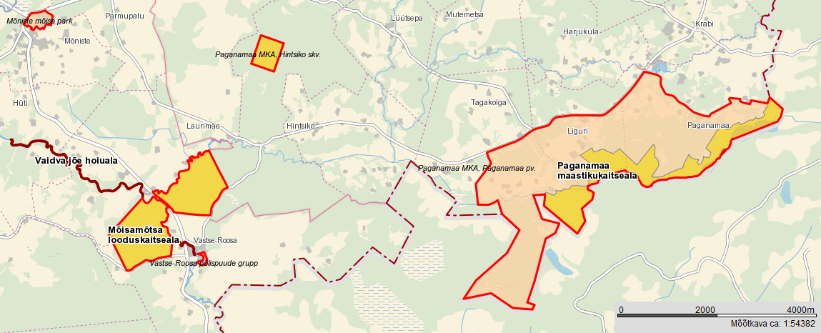 Paganamaa MKA ja Mõisamõtsa LKA Maa-ameti kaardil.